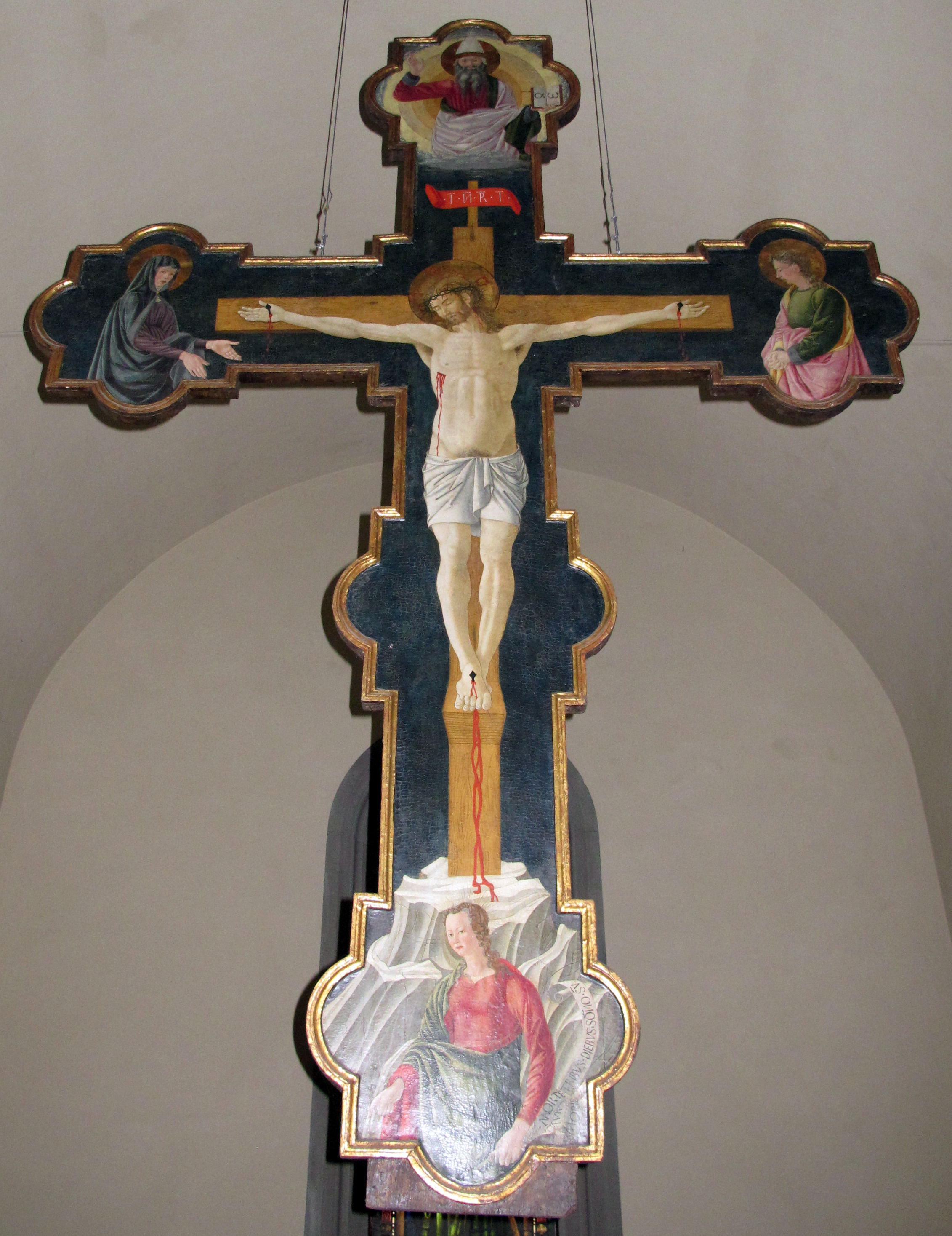 Chiesa di Sant'Andrea a San Donnino (Campi Bisenzio)